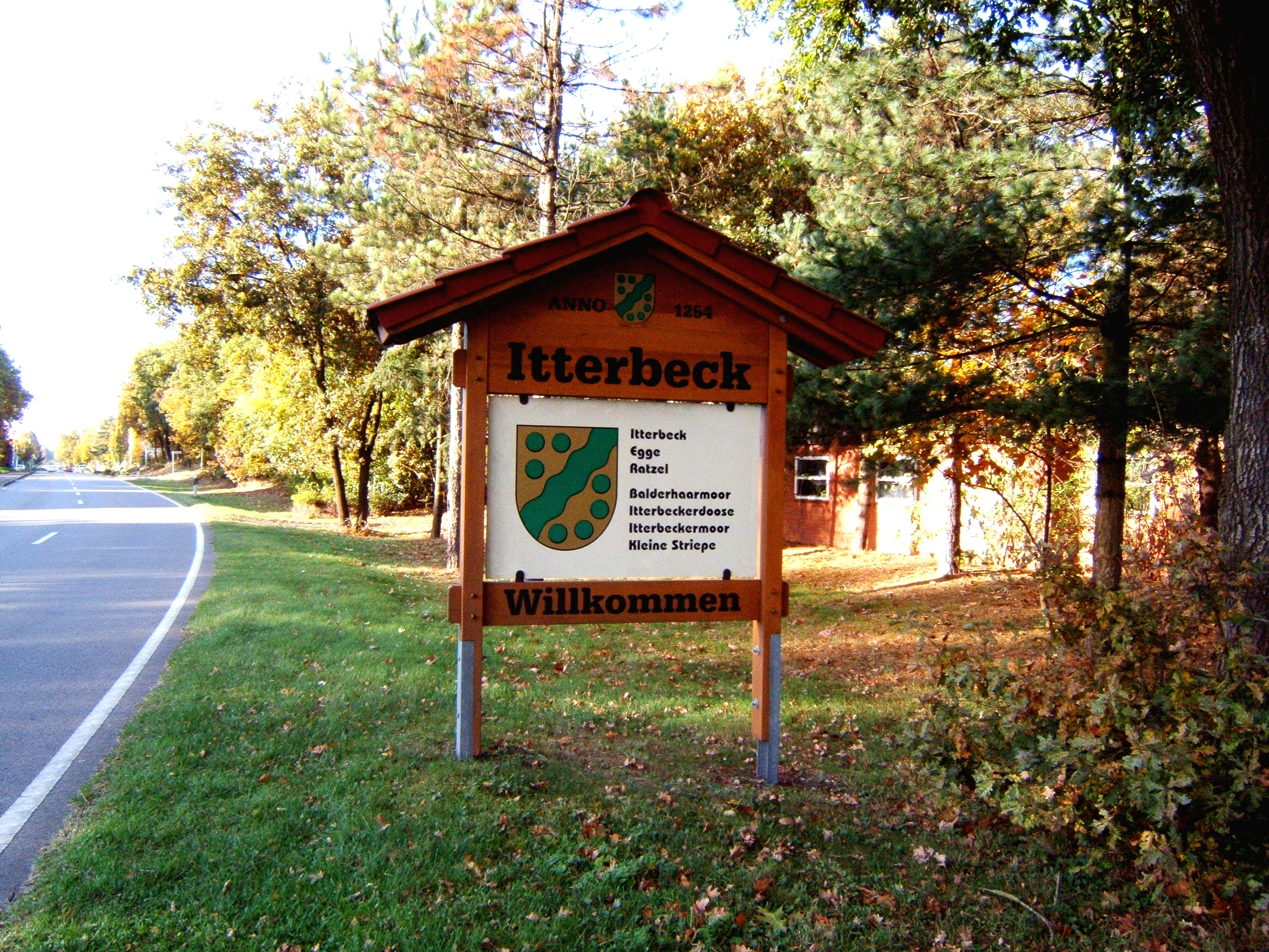 Willkommensschild mit dem Wappen der Gemeinde an einer der Zufahrtsstraßen von Itterbeck